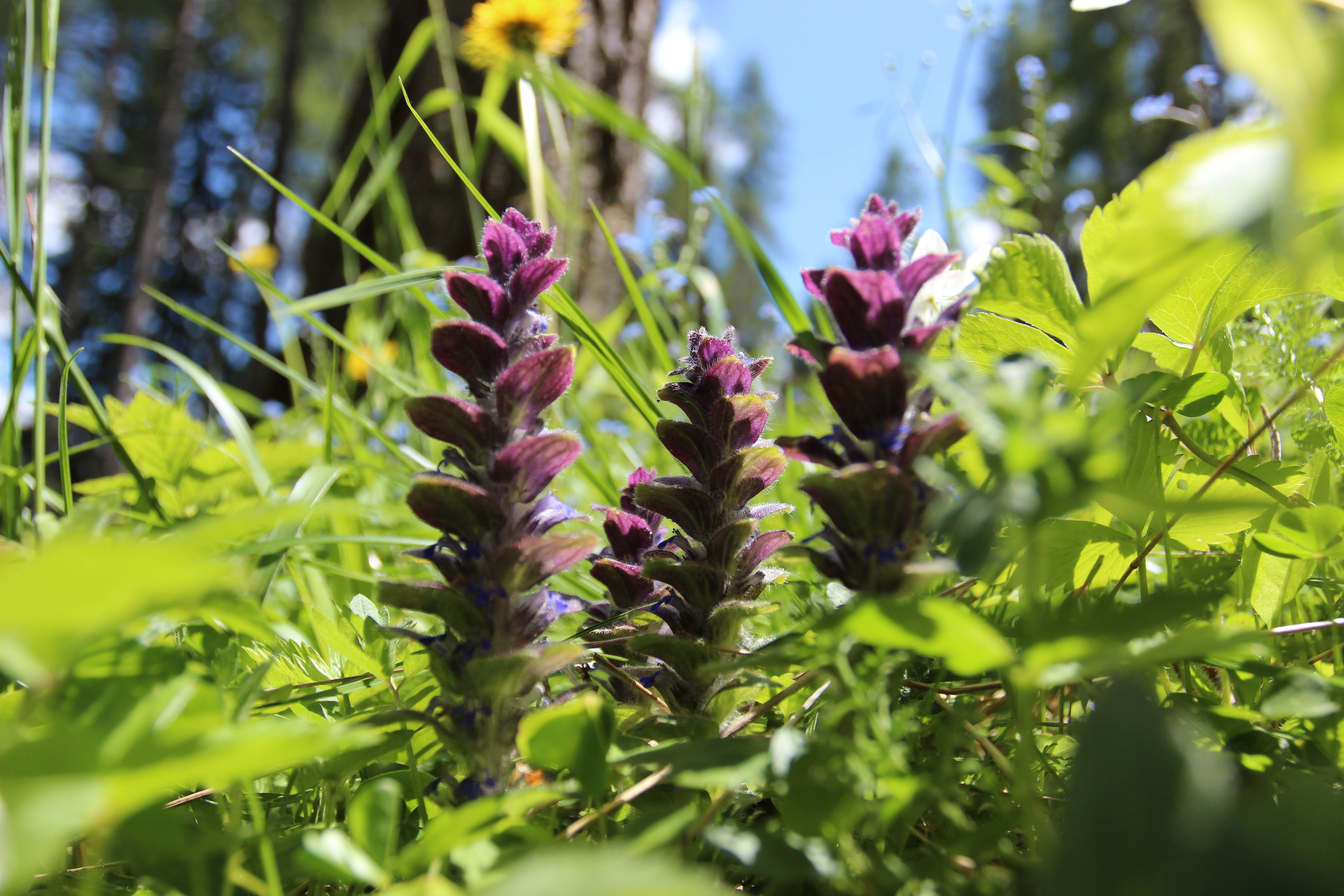 Pyramiden-Günsel (Ajuga pyramidalis L.)